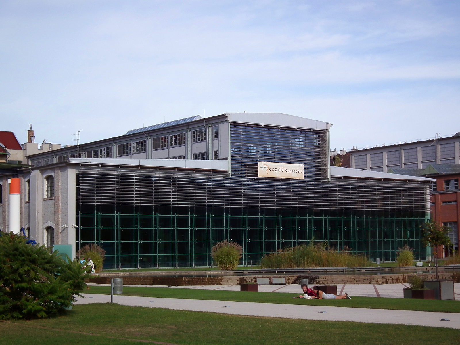 D épület - nagyforgácsoló (Budapest 2, Felvinci út 16-20., Marczibányi tér 13.) This is a photo of a monument in Hungary. Identifier: 18592